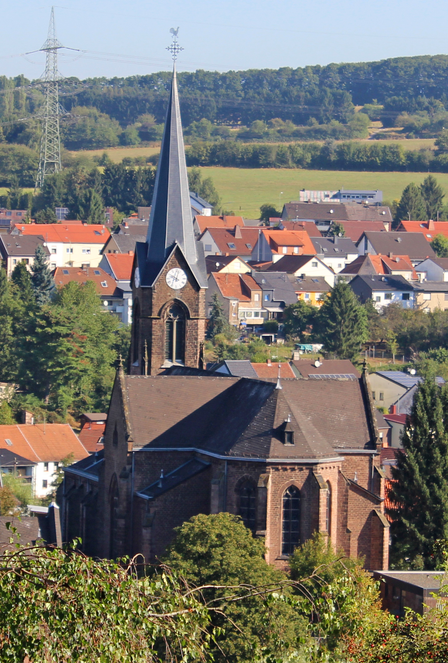 Die katholische Pfarrkirche St. Michael in Wemmetsweiler, Gemeinde Merchweiler, Saarland